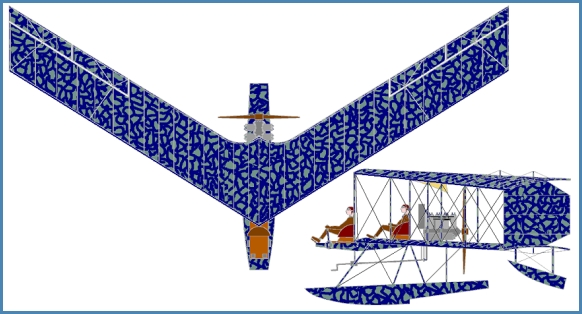 Burgess AH7